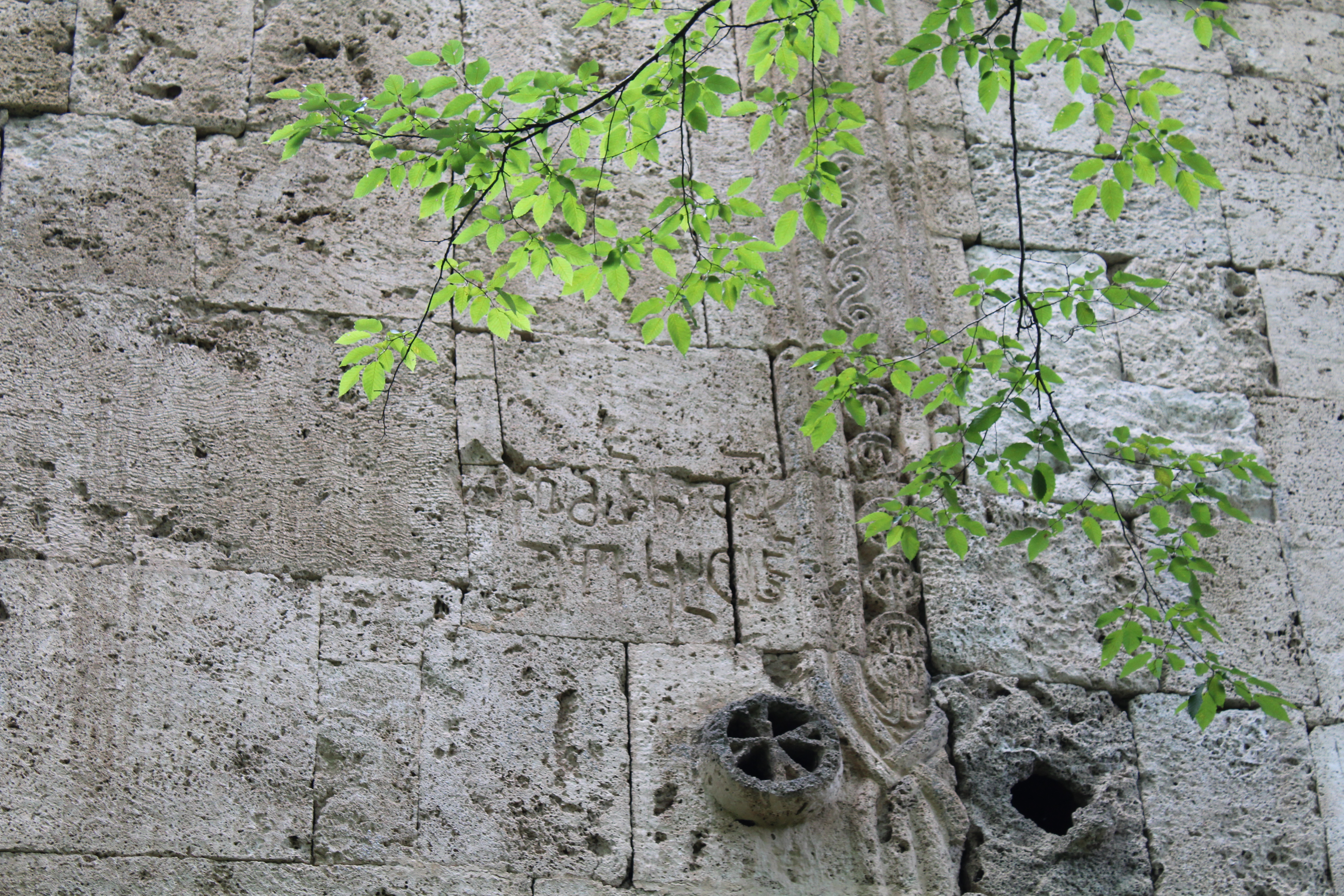 კურტანიძეულის წმინდა მარინეს ეკლესიის წარწერა